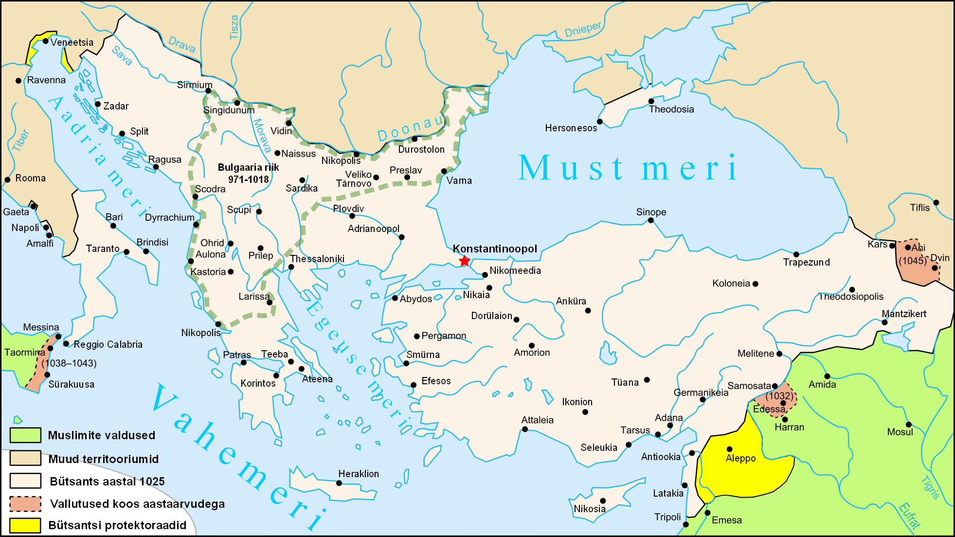 Bütsants (1025)